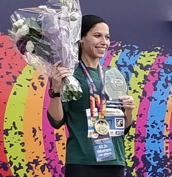 ביטי דויטש